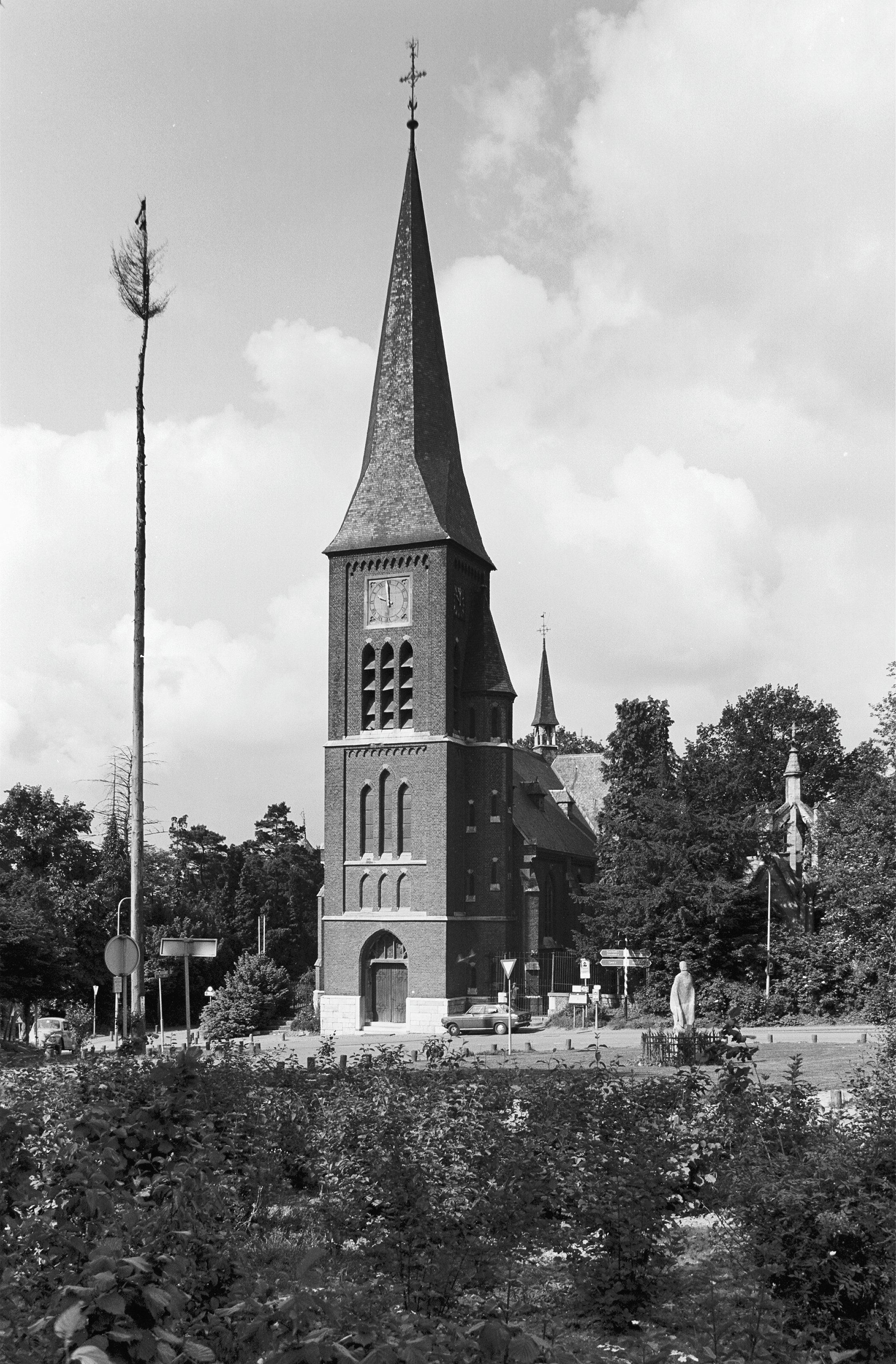 Rooms-Katholieke Kerk: westgevel (opmerking: Gebruikt voor Monumenten In Nederland Limburg, bladzijde 264)